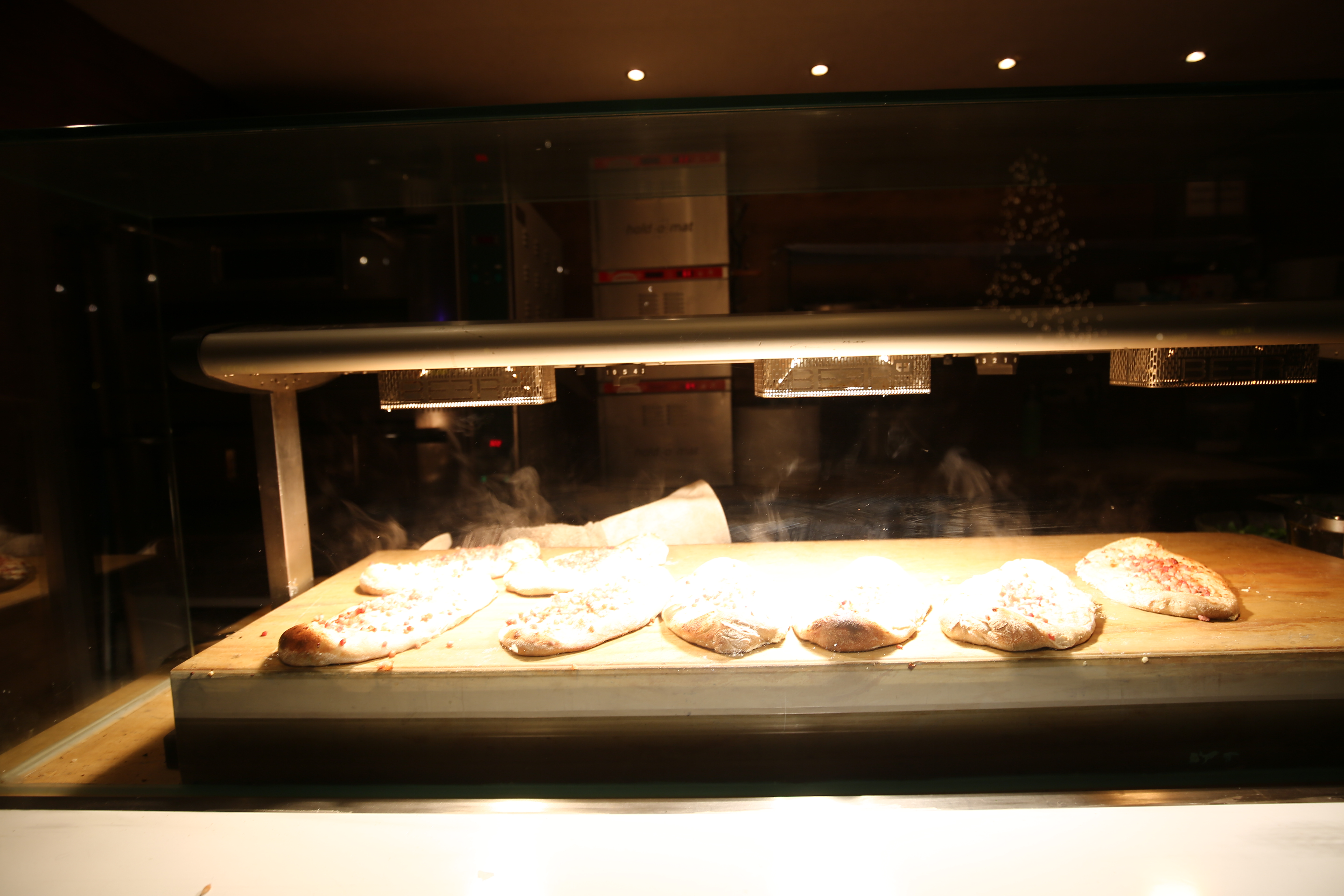 Rahmfleckerl auf dem Christkindlmarkt am Chinesischen Turm